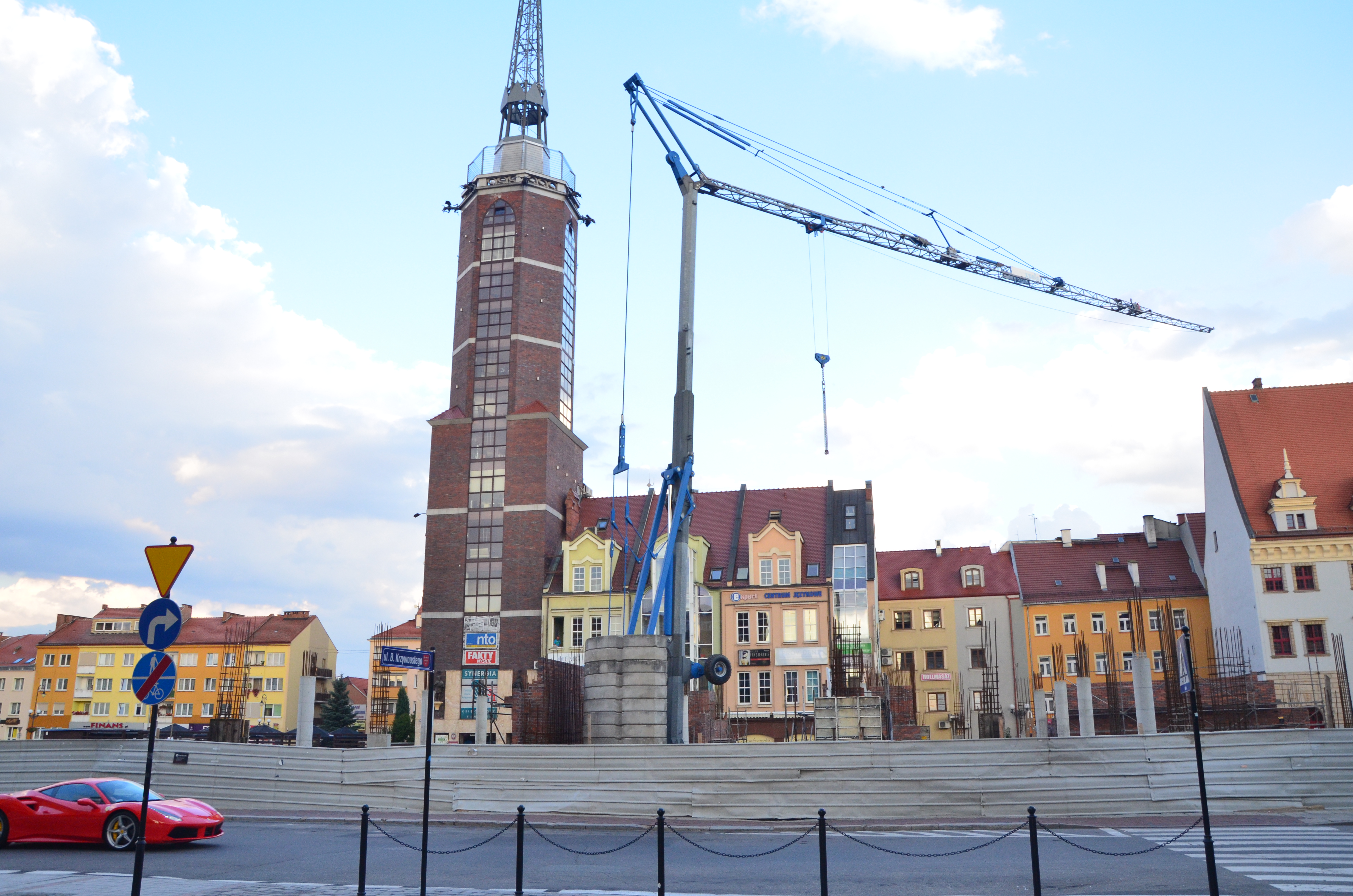 Nysa centrum - stare miasto - ratusz